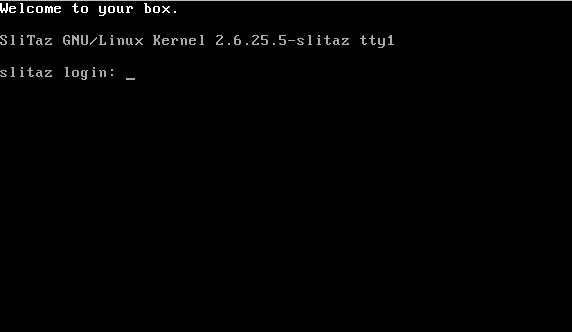 صورة الواجه النصية لنظام التشغيل لينكس.